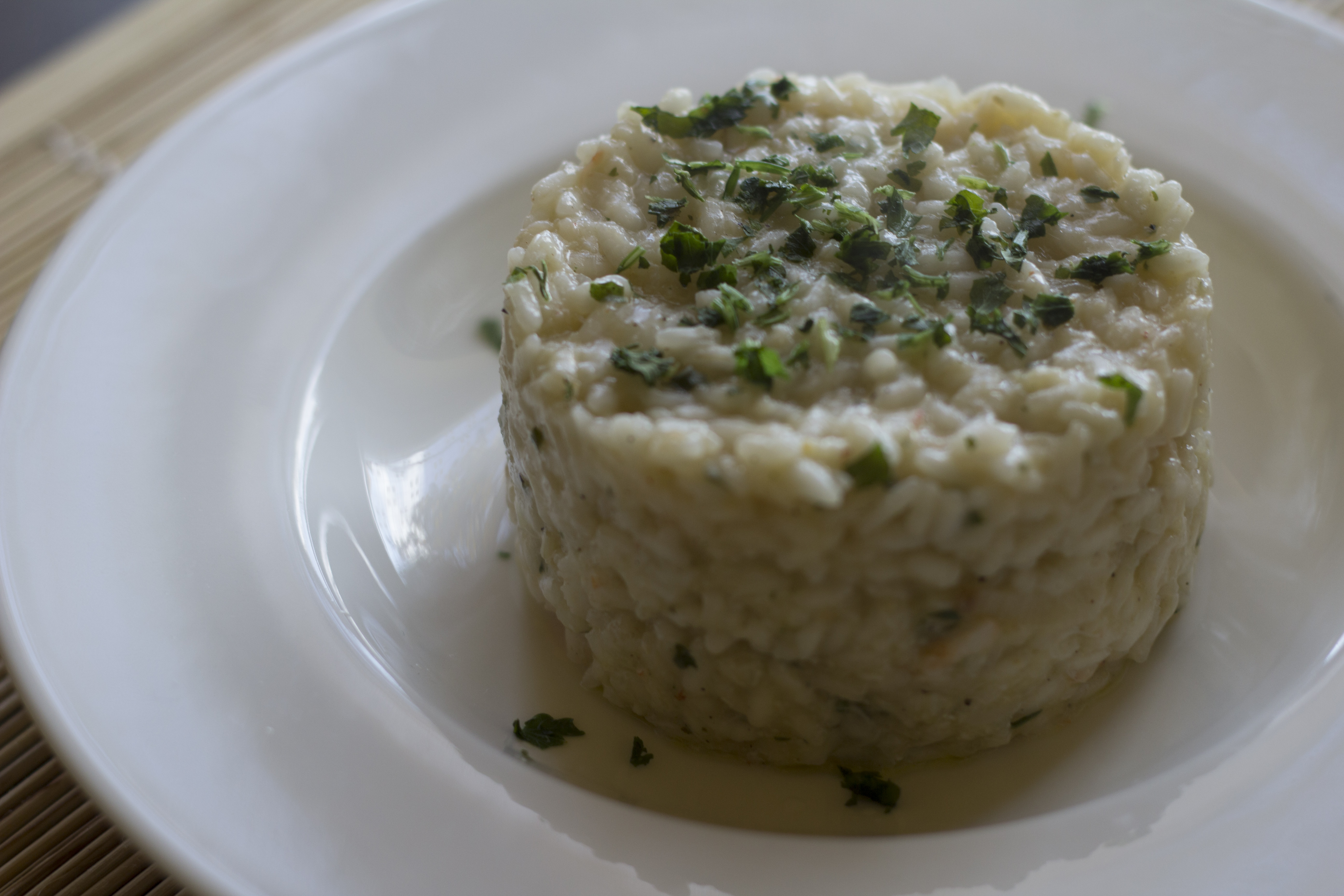 Crab risotto (Recipe in italian: )